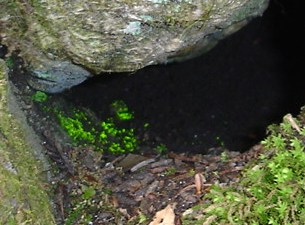 hikarigoke.JPG(28.5k)